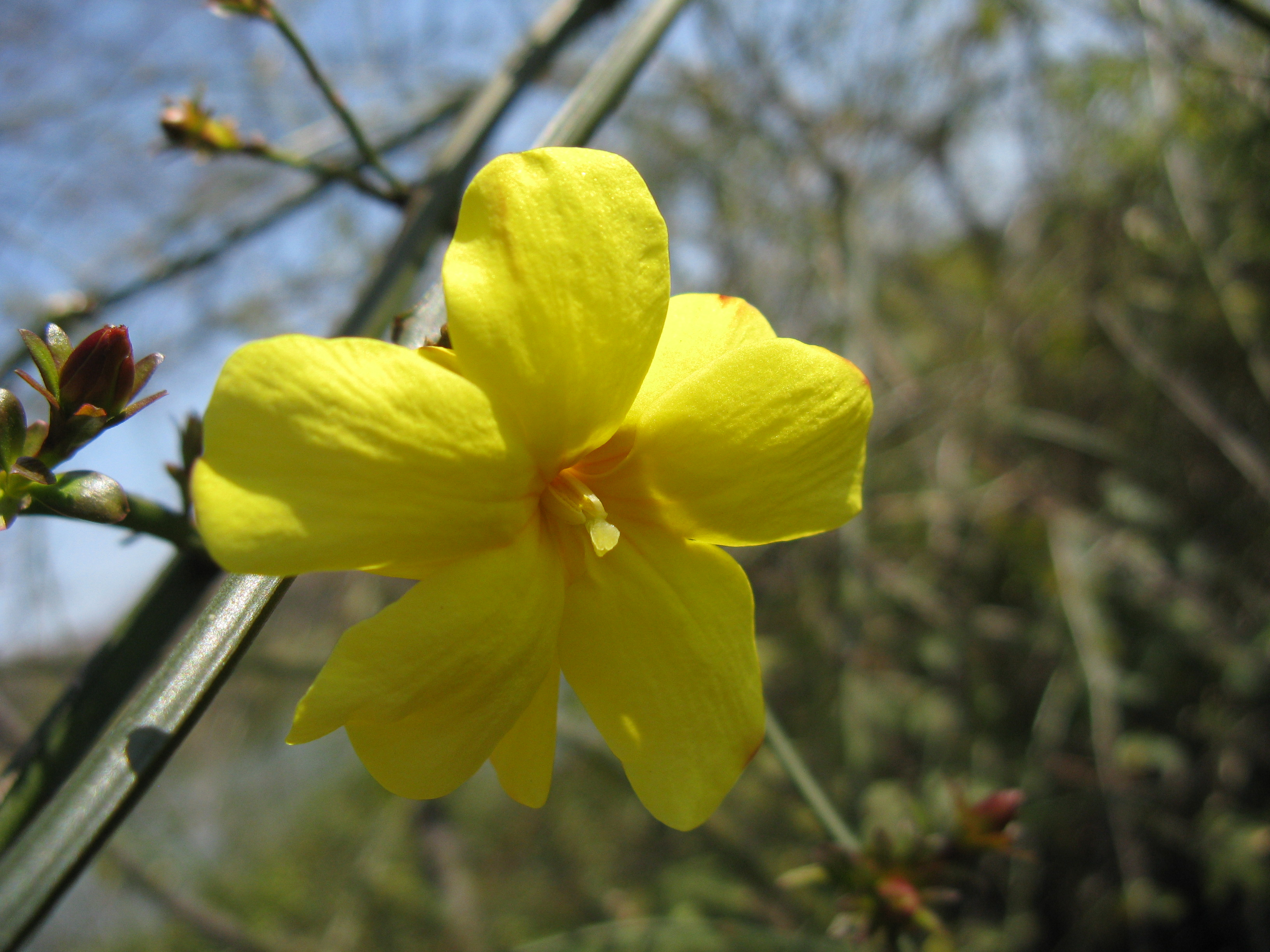 Jasminum mesnyi